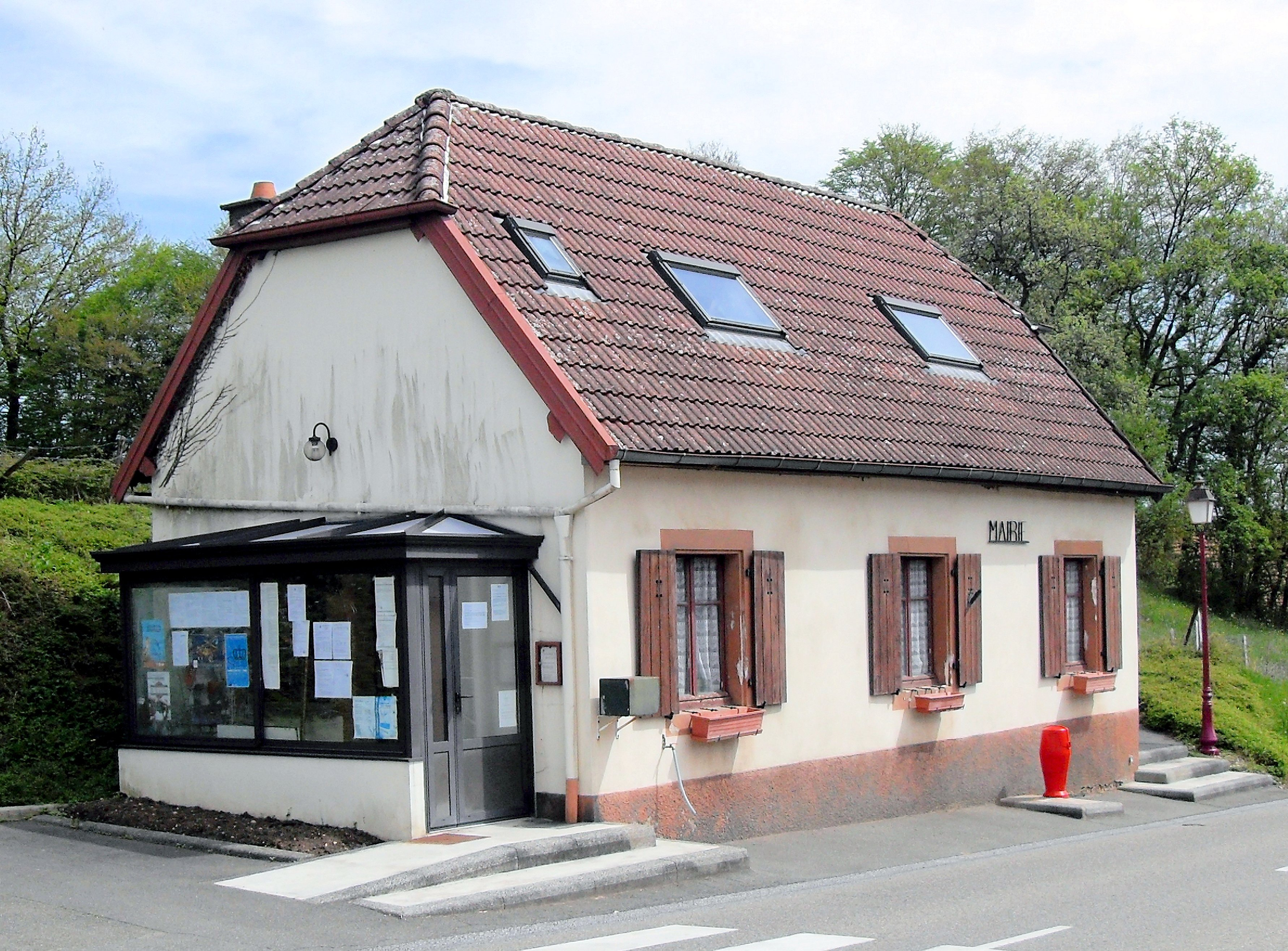 La mairie de Botans